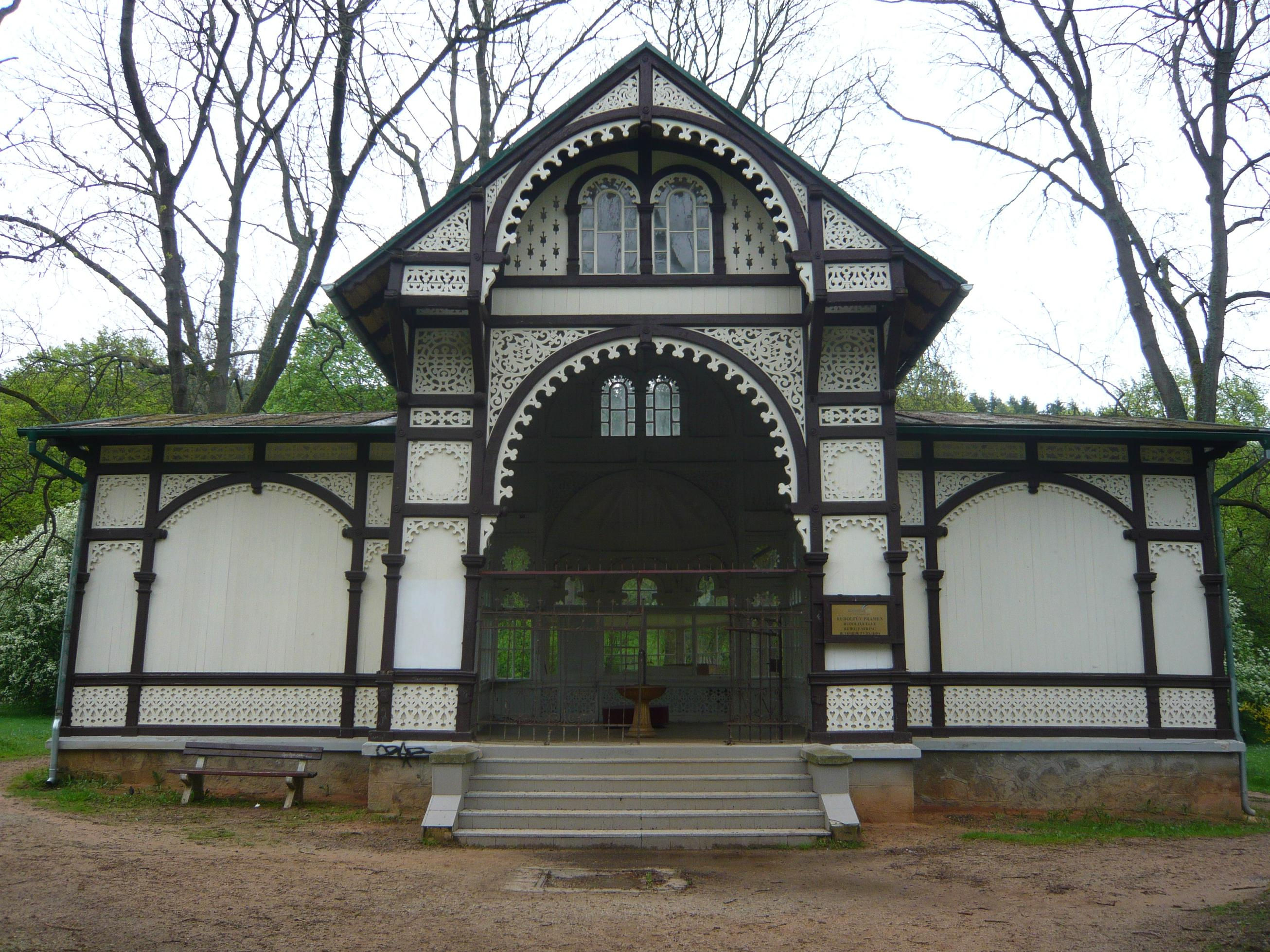 Pavilon Rudolfova pramene